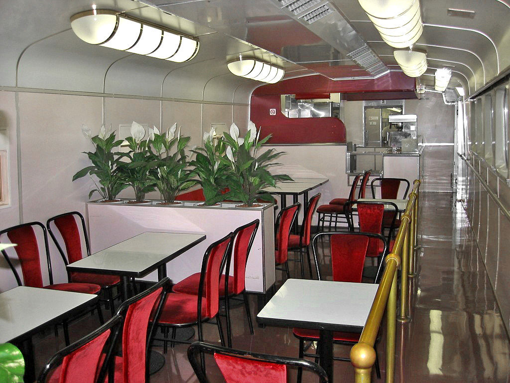 「ウエストひかり」に連結されていたビュフェ。晩年の「こだま」号車内にて、フリースペースとして連結されていた。